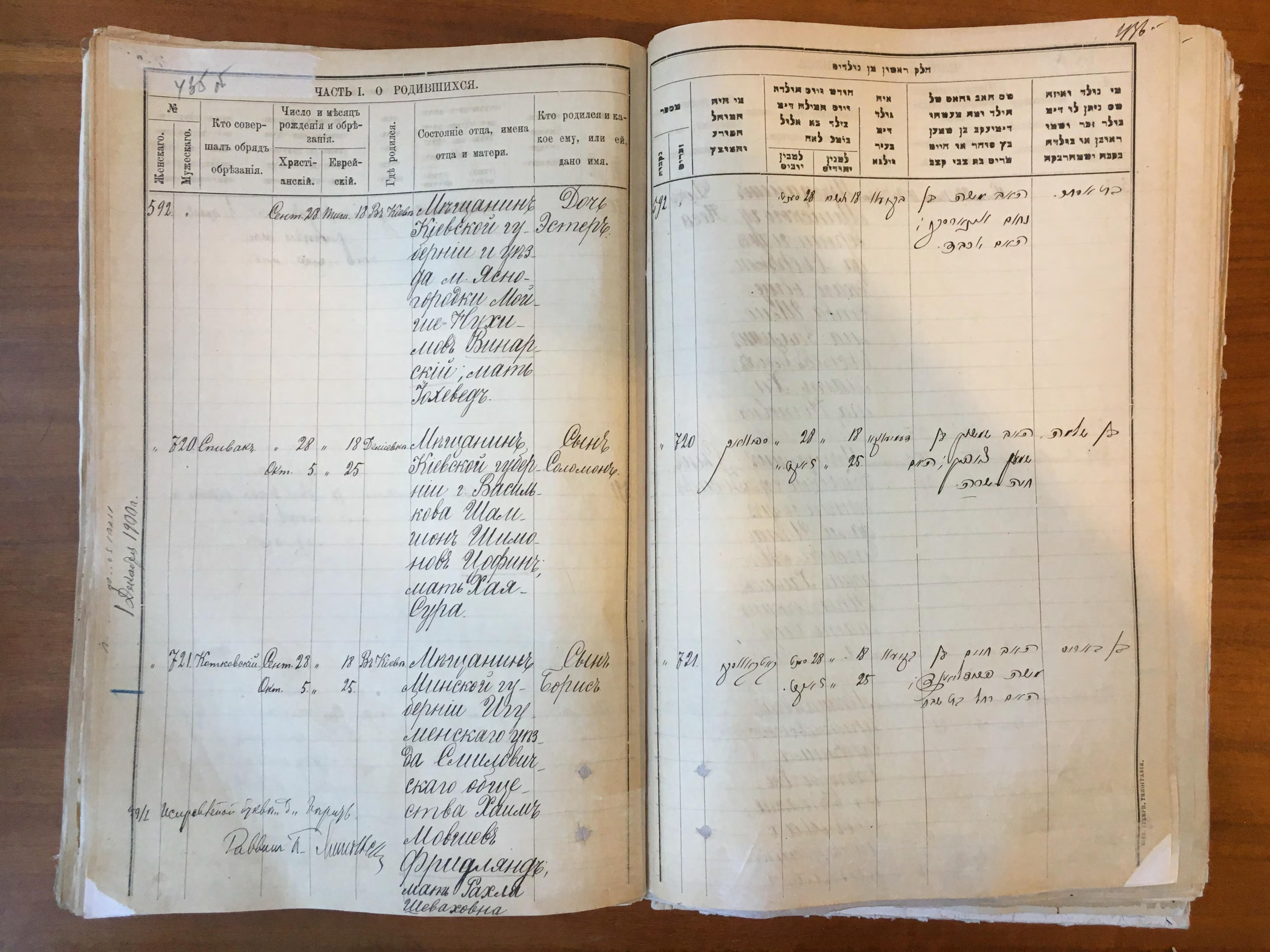 Метрическая запись о рождении Бориса Фридлянда (Бориса Ефимова)